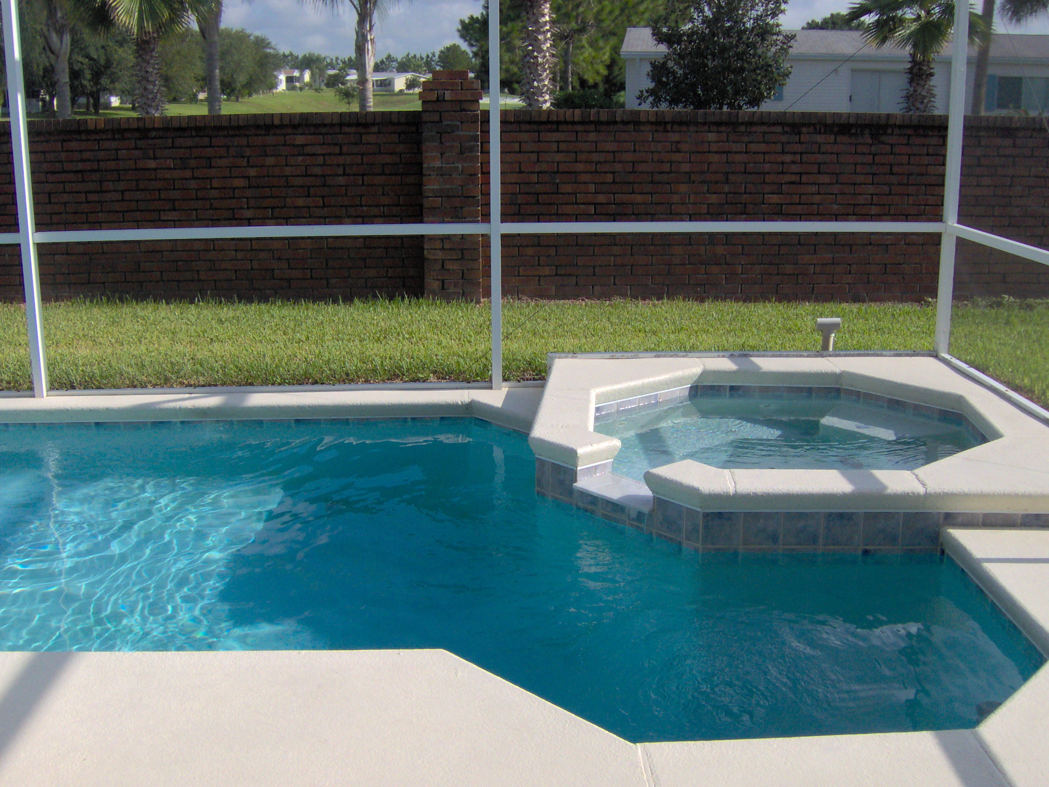 בריכה קטנה עם ג'קוזי